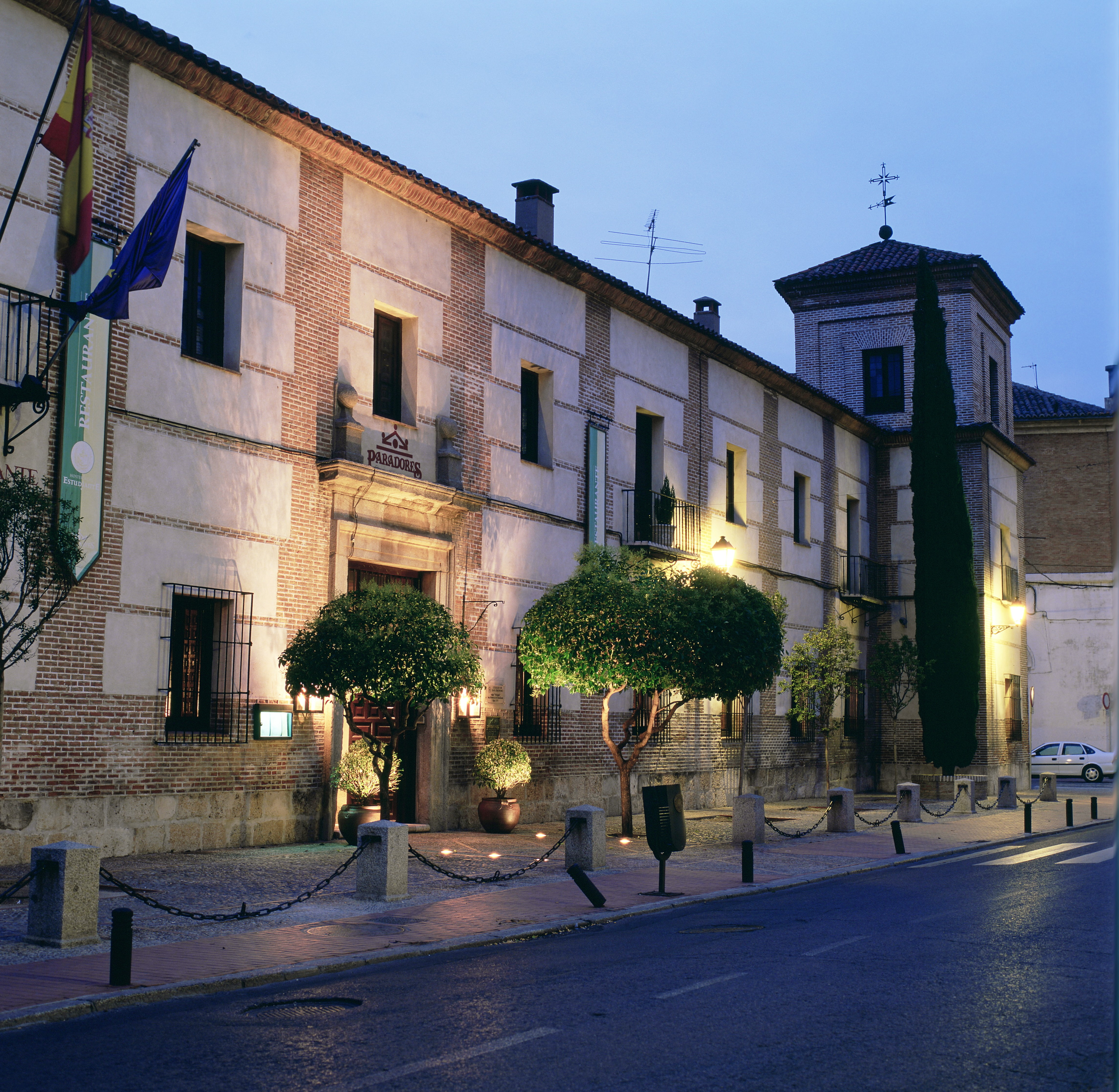 Parador de Alcalá de Henares fachada